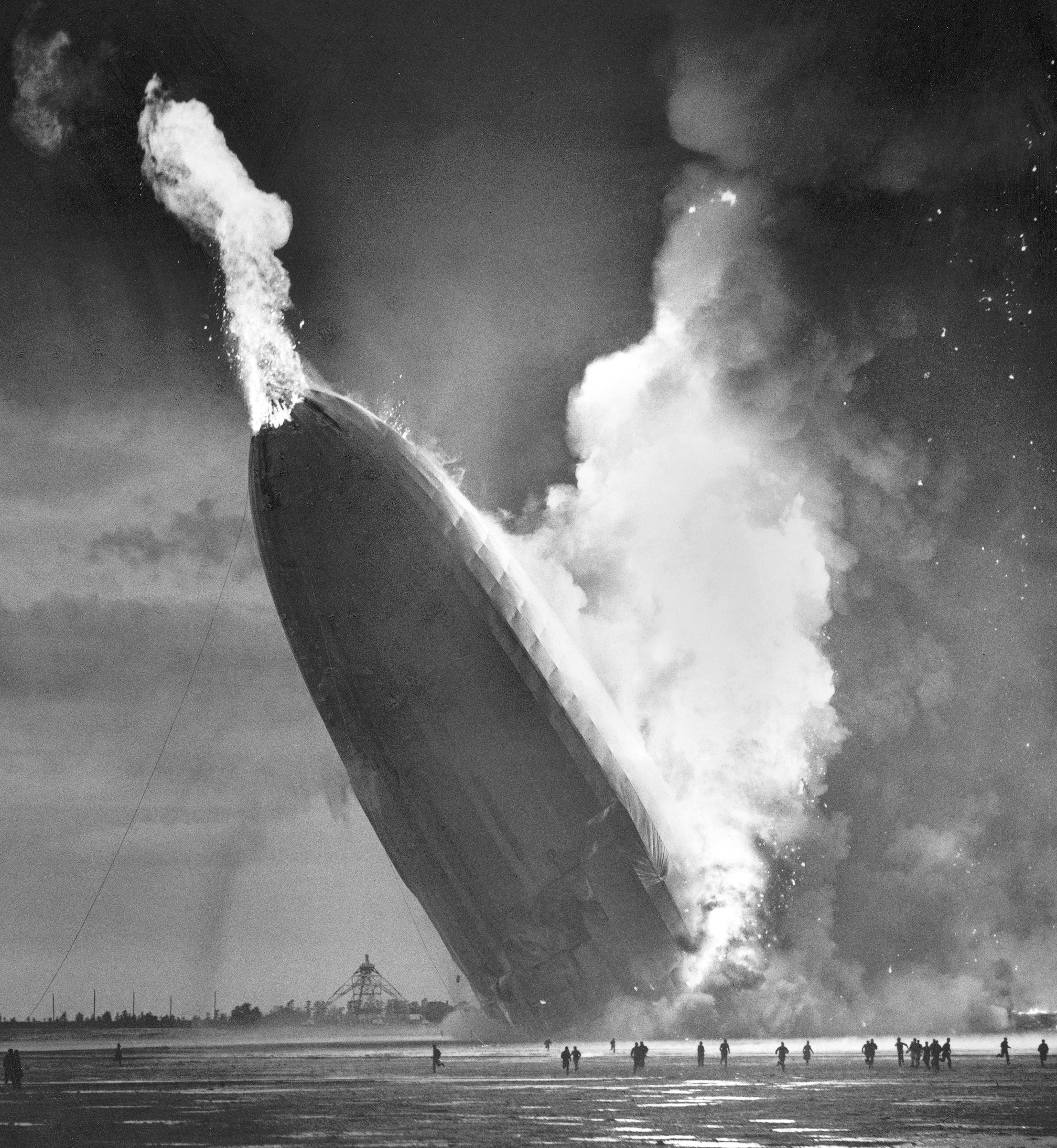 Hindenburg zeplini yere çakılırken. Photo of the crash of the airship Hindenburg in Lakehurst, New Jersey on May 6, 1937.